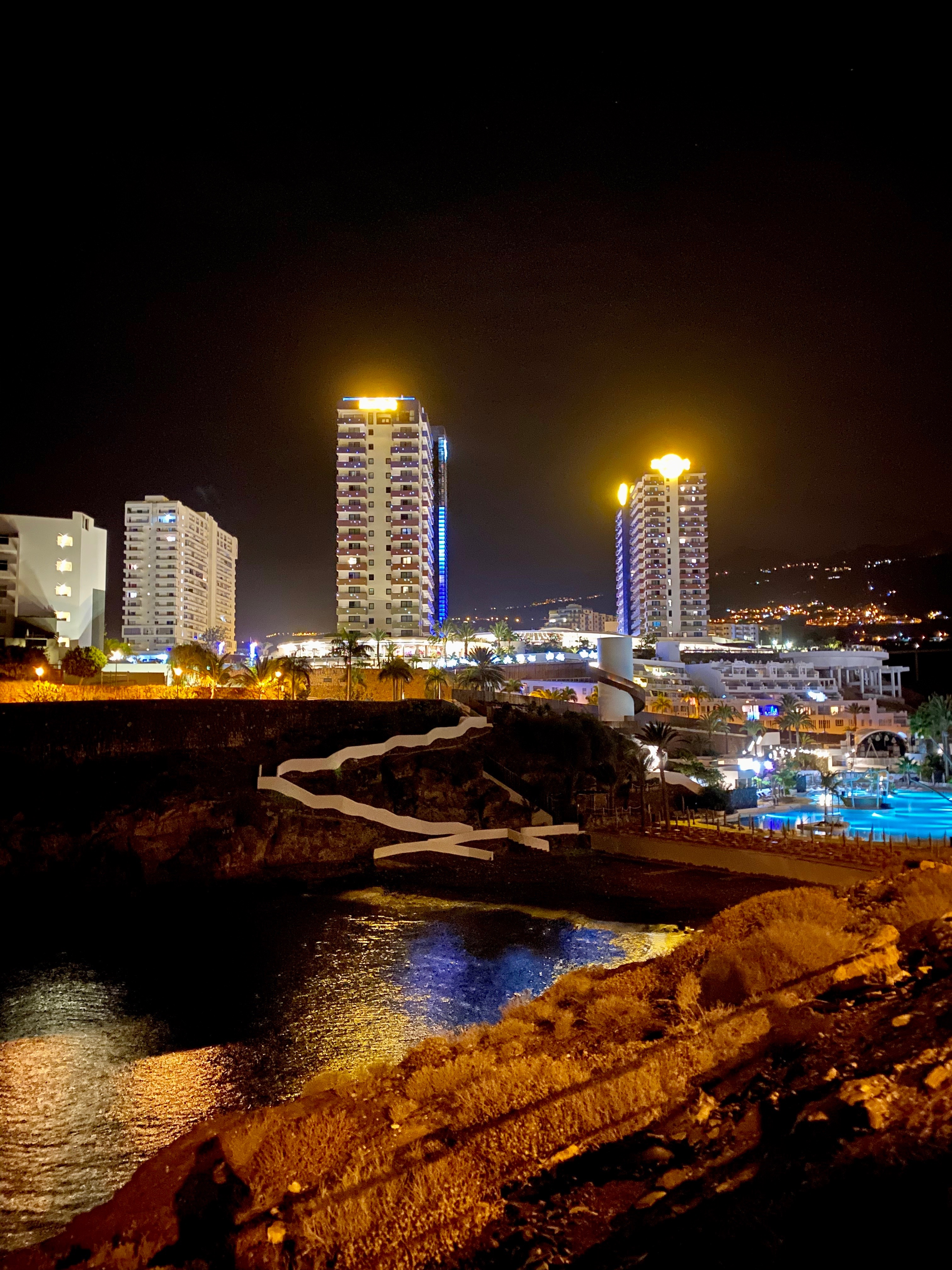 Torres del Hard Rock Hotel Tenerife durante la noche.